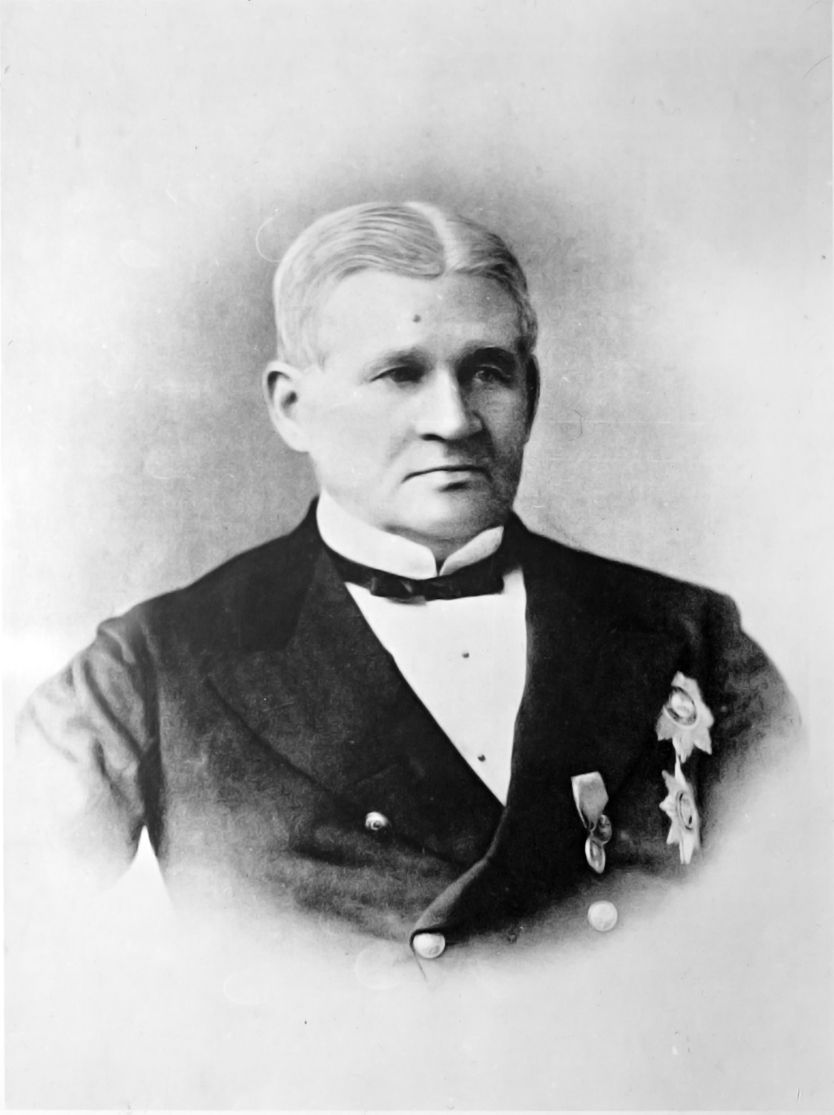 Замятнин Д. Н. (1805–1881), государственный деятель